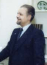 Ahmad Zaki Yamani